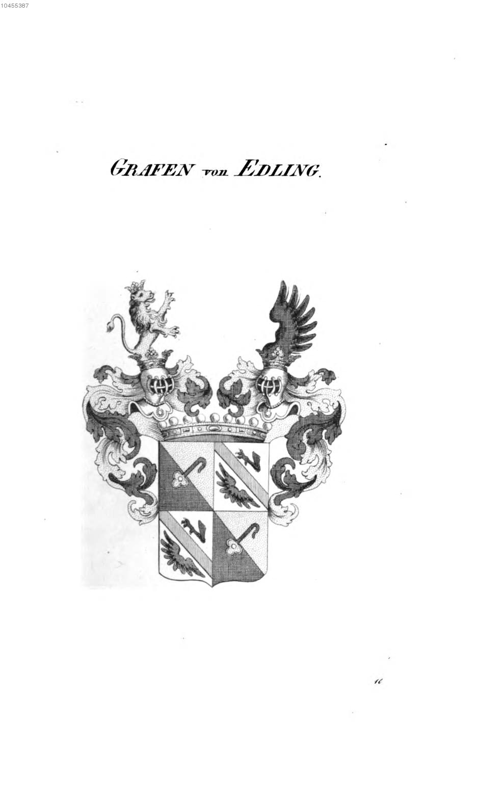 Wappen Edling - Tyroff HA.jpg